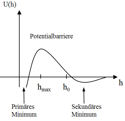 Zwei-Teilchen Wechselwirkungspotential U als Funktion des Abstands h für elektrisch stabilisierte Teilchen.